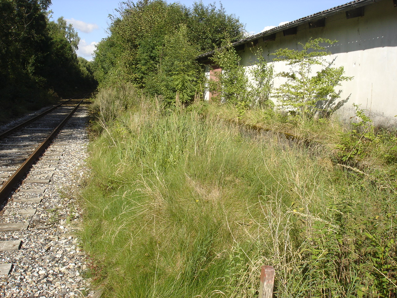 Frugtlager ved Frugtplantagen trinbræt